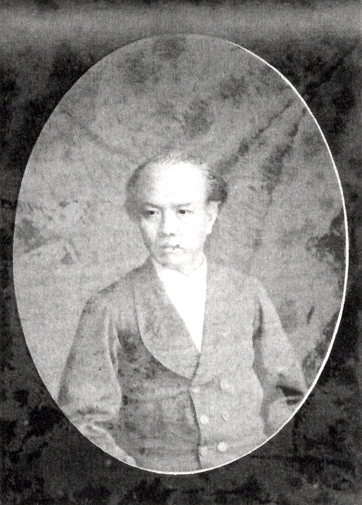 米倉昌言の肖像写真。